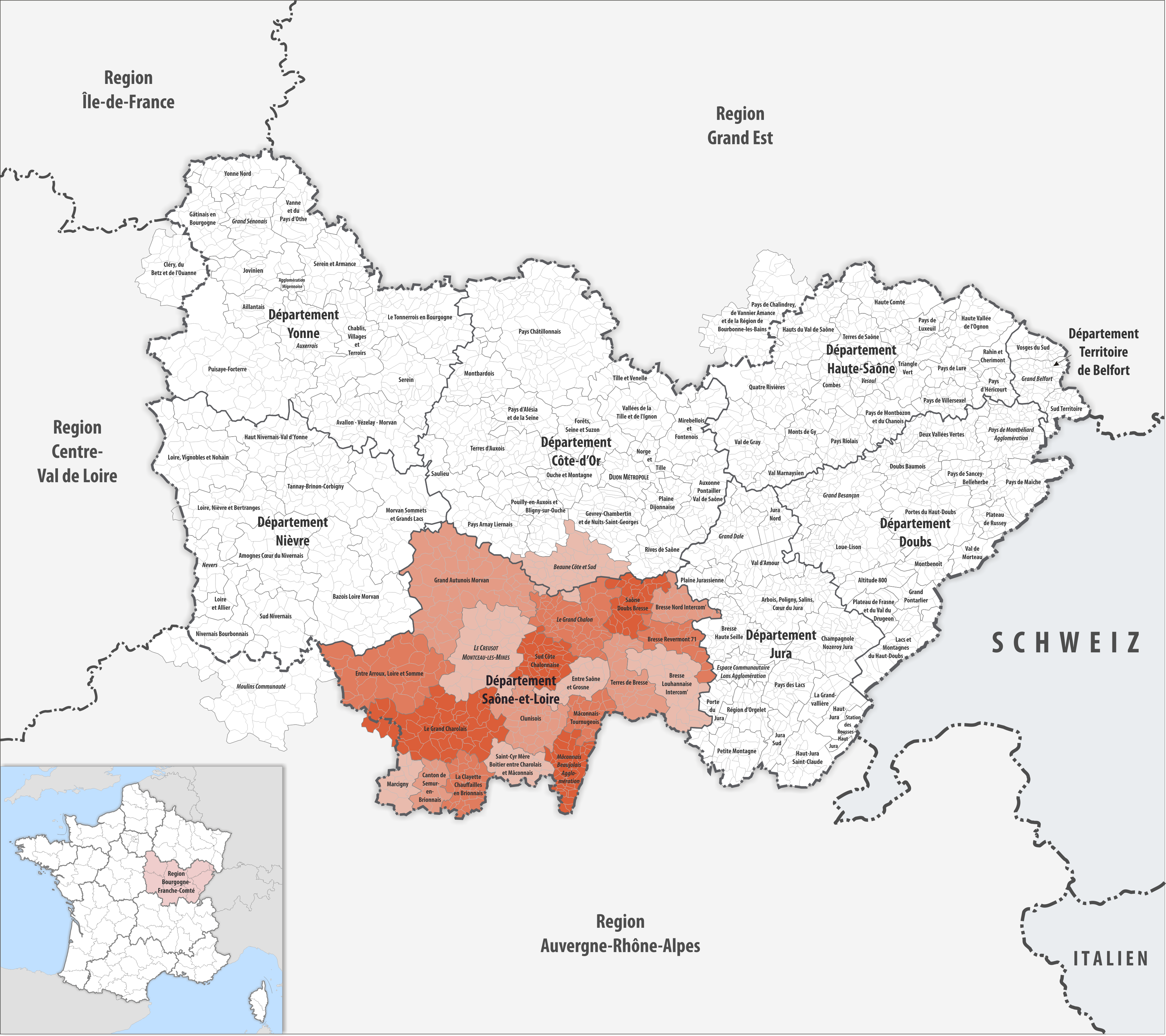 Lage des Gemeindeverbandes Saône-et-Loire